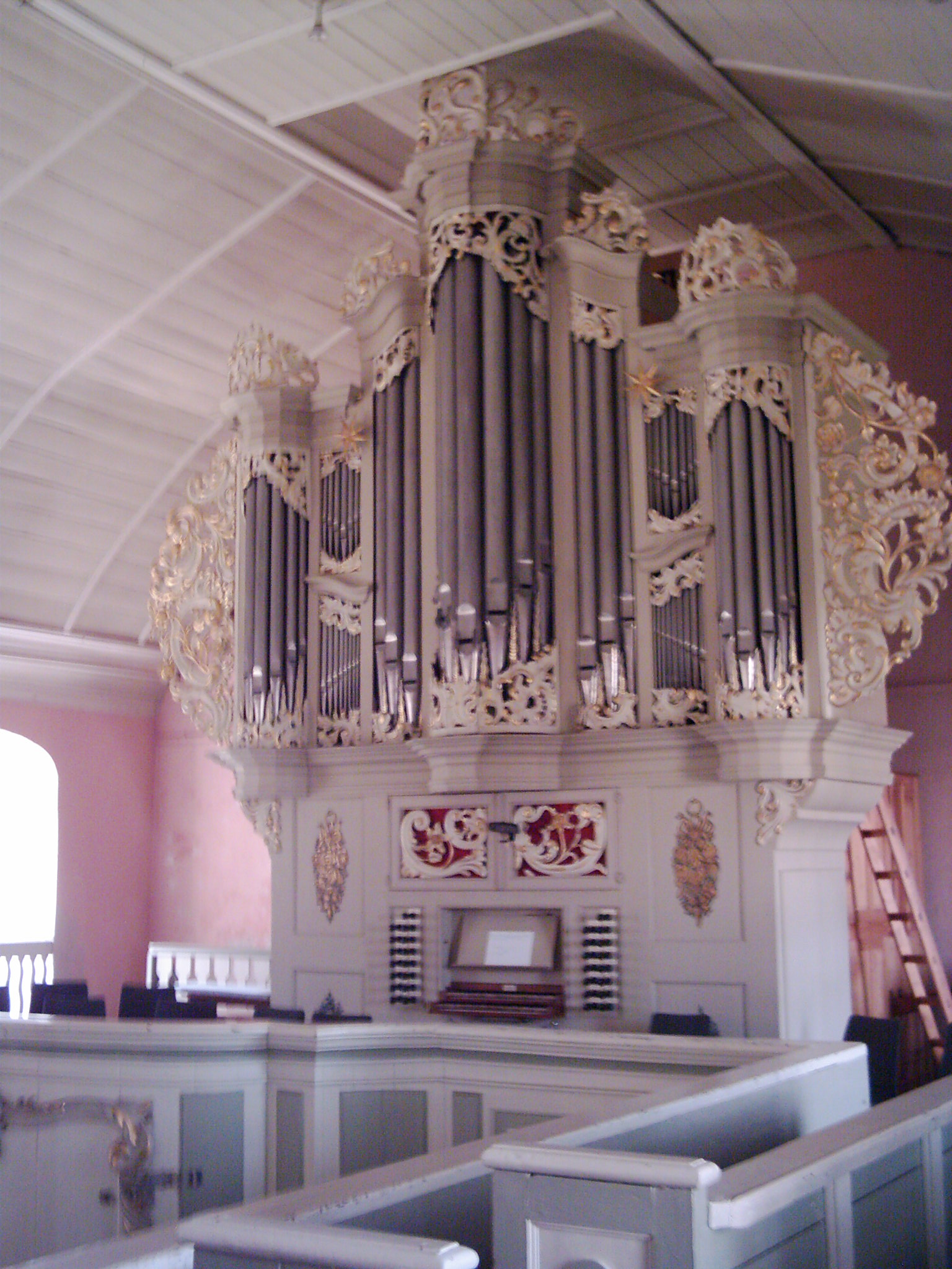 ST. Nikolai, Orgel